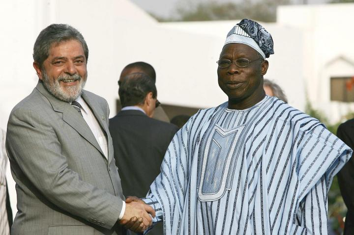 Abuja/Nigéria - Presidente Lula cumprimenta o presidente da Nigéria, Olosegum Obasanjo, na chegada ao país. Foto: Ricardo Stuckert/PR.